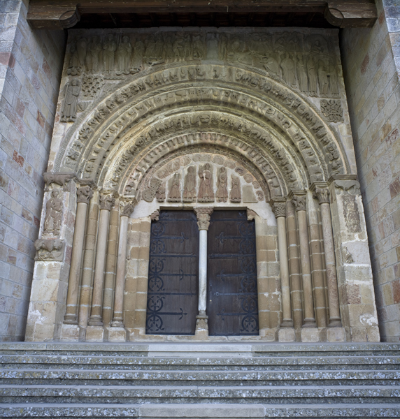 unidentified Spain